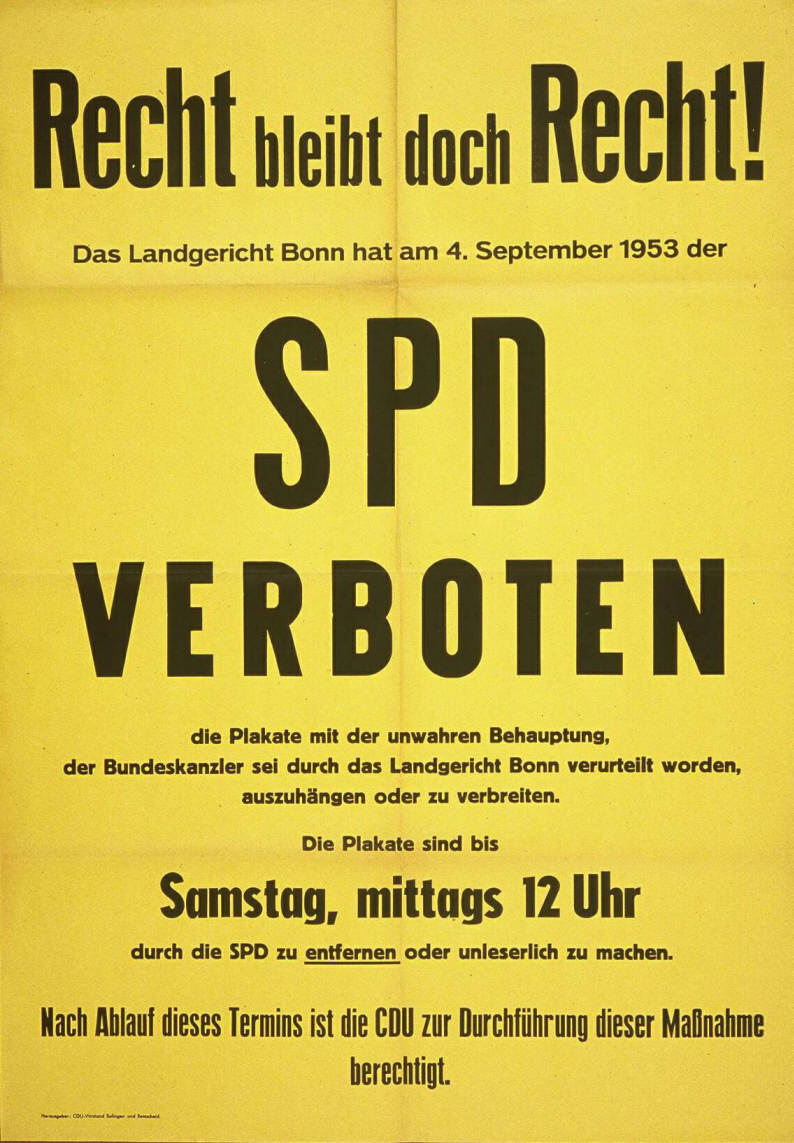 Recht bleibt doch Recht! Das Landgericht Bonn hat am 4. September 1953 der SPD verboten ... Kommentar: Reaktion auf Plakat Nr. 449, Verbot der Plakatierung bzw. Entfernung des Plakats Nr. 449. Plakatart: Textplakat Allgemein Auftraggeber: CDU-Vorstand Solingen und Remscheid Objekt-Signatur: 10-001: 450 Bestand: Plakate zu Bundestagswahlen (10-001) GliederungBestand10-18: Plakate zu Bundestagswahlen (10-001) » Die 2. Bundestagswahl am 6. September 1953 » CDU » Textplakate allgemein Lizenz: KAS/ACDP 10-001: 450 CC-BY-SA 3.0 DE